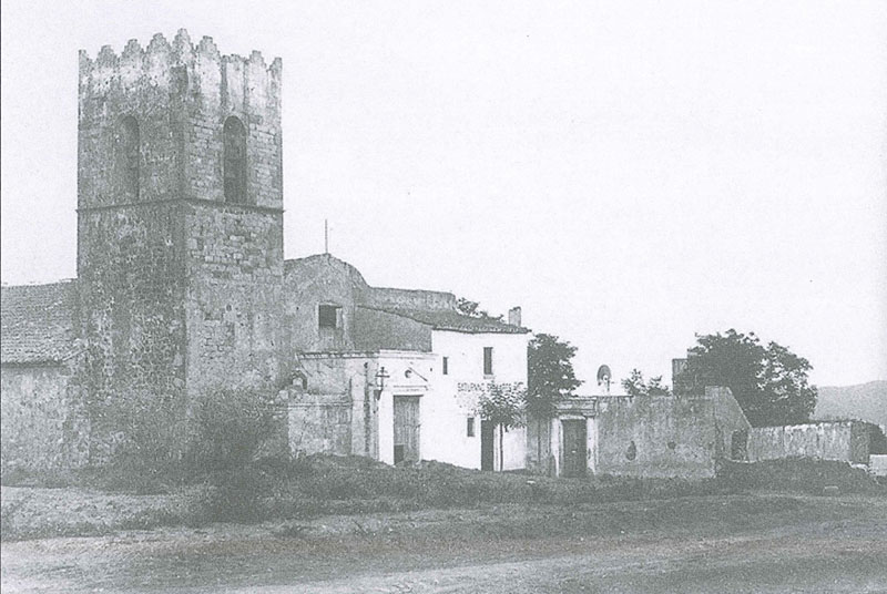 Foto de la desapareguda església antiga de Sant Joan d'Horta, a Barcelona